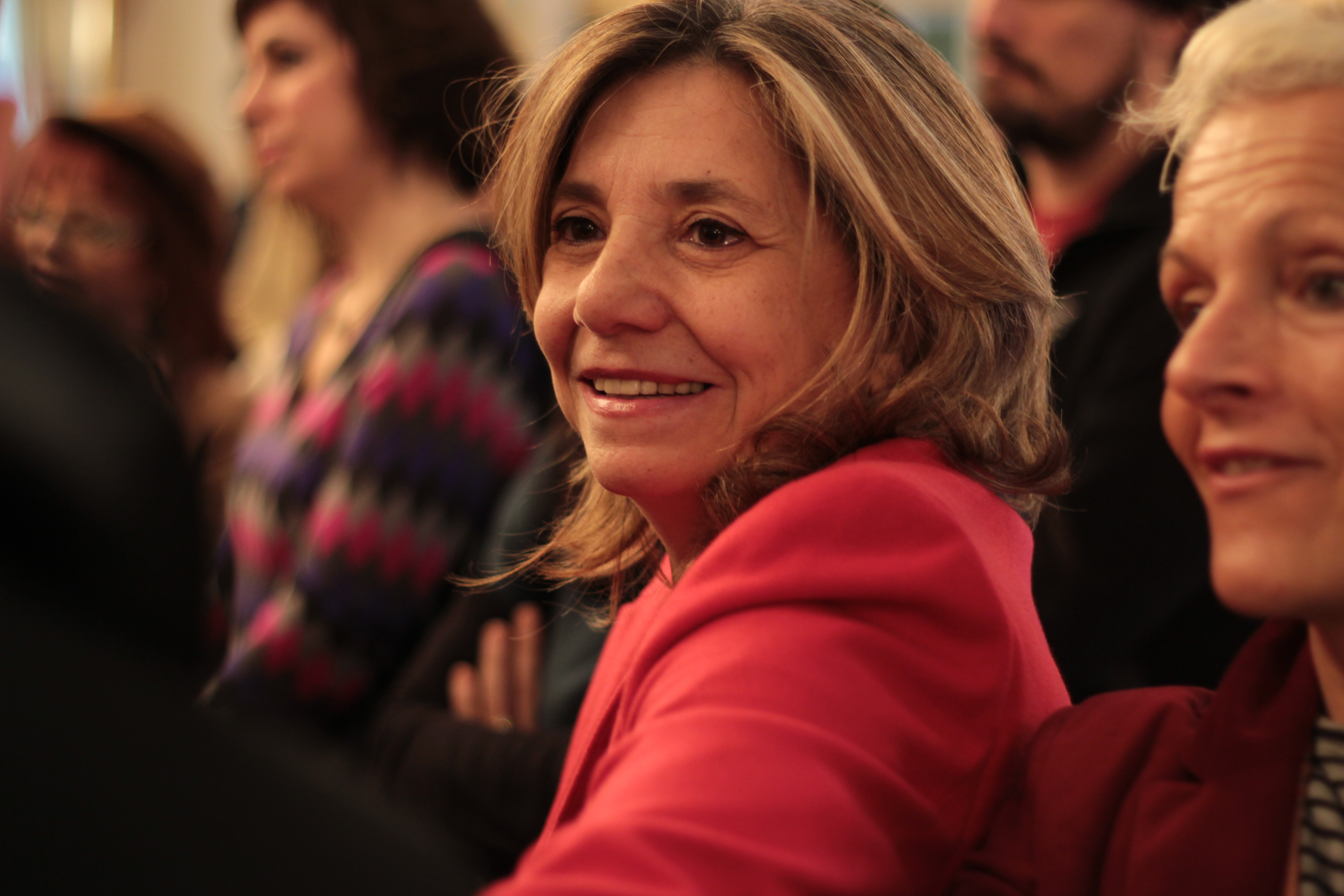 Isona Passola, productora de Pa Negre, a l'acte de presentació dels nominats dels IV premis Gaudí de Cinema Isona Passola, producer of Pa Negre in the event of presentation of the nominees of the IV Gaudí Awards.